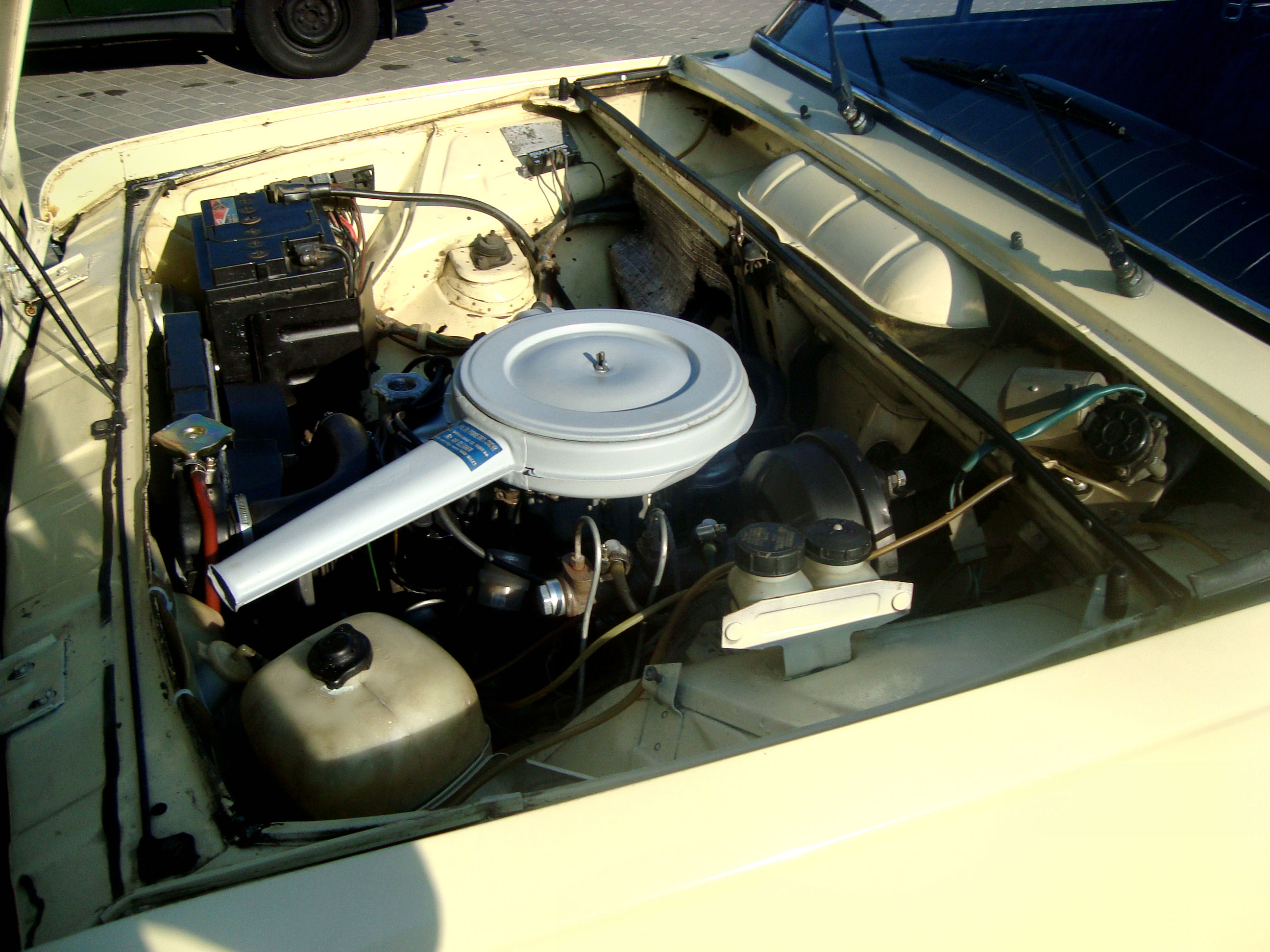 FSO 125p 1.5 C z roku 1985 w Jaśle.